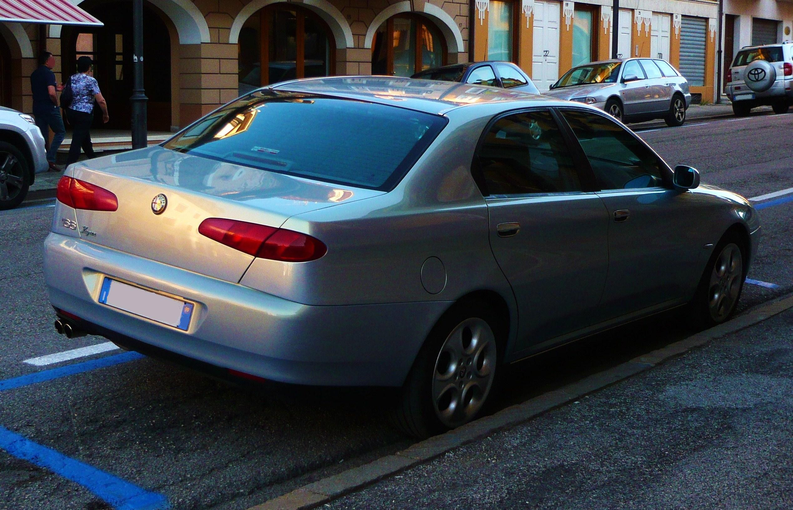 Alfa Romeo 166 Super, nel particolare colore Azzurro Nuvola cangiante